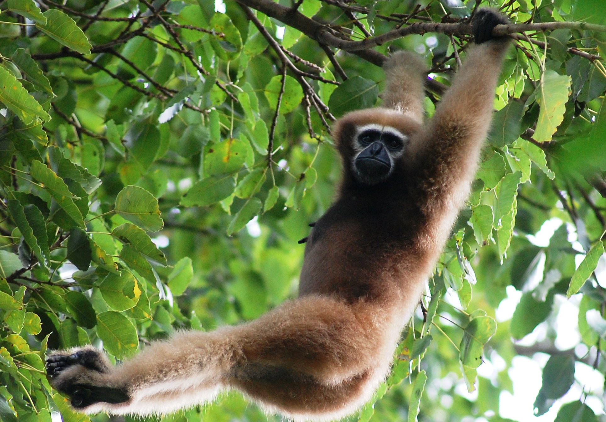 Femelle Hoolock, Meghalaya.